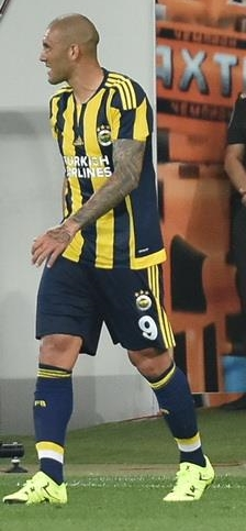 José Fernando Viana de Santana (Fernandão), 5 Ağustos 2015 tarihindeki Şahtar Donetsk karşılaşmasında, Fenerbahçe formasıyla.